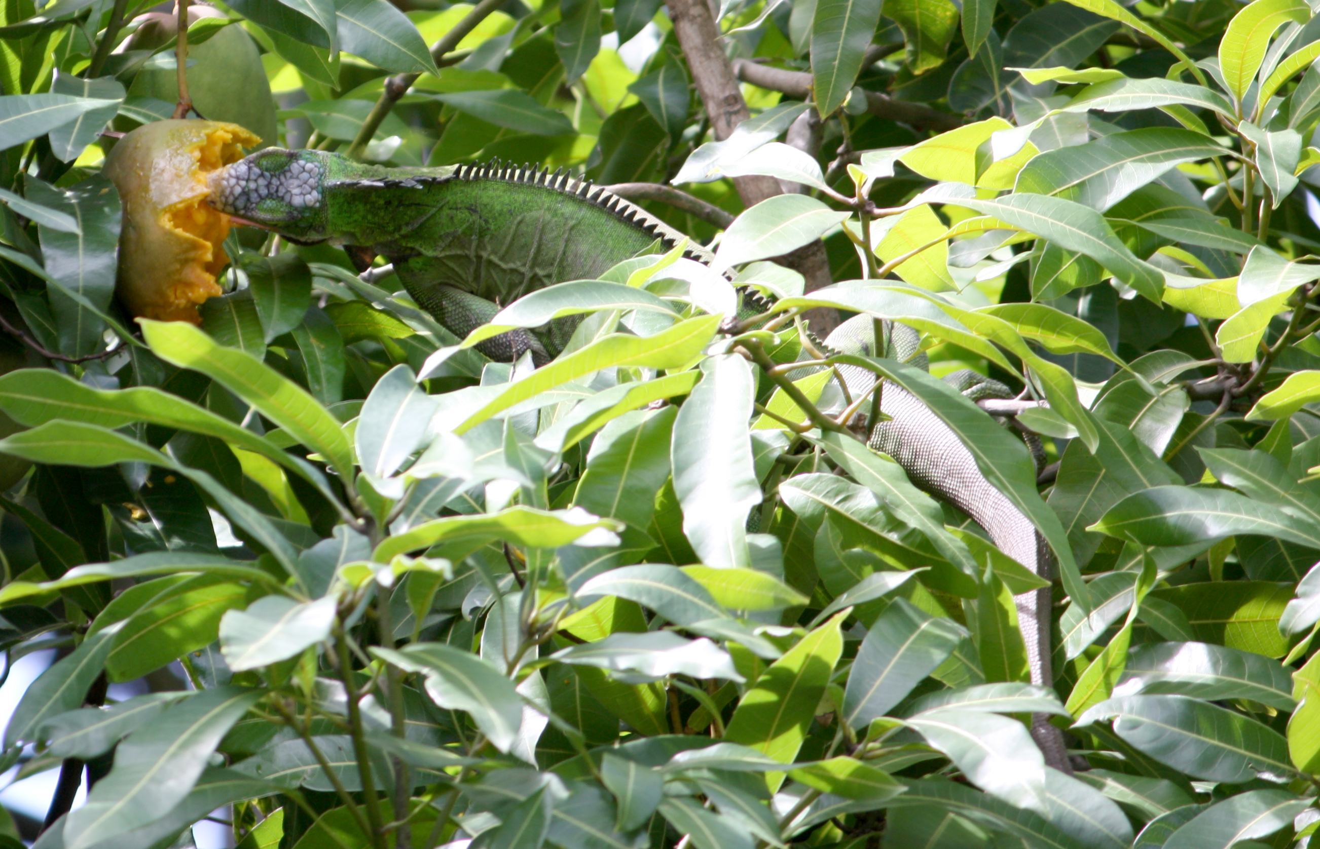 Lesser Antillean Iguana (Iguana delicatissima) feeding in a mango tree. Coulibistrie, Dominica.